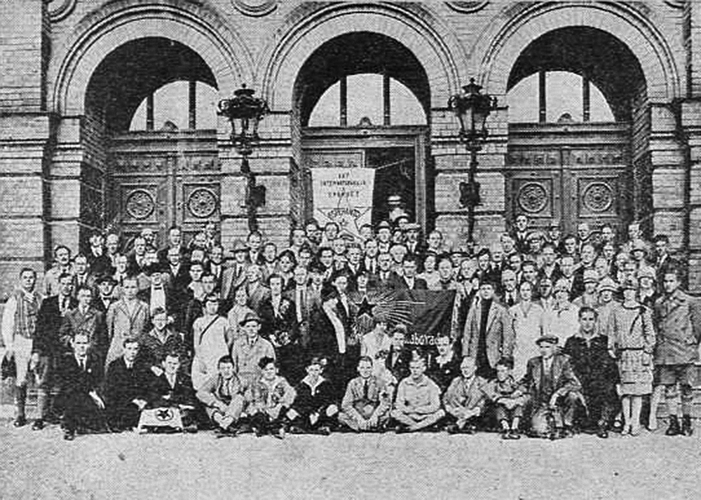 Komuna foto de la partoprenantoj de la 8-a SAT-kongreso en Gotenburgo, 1928